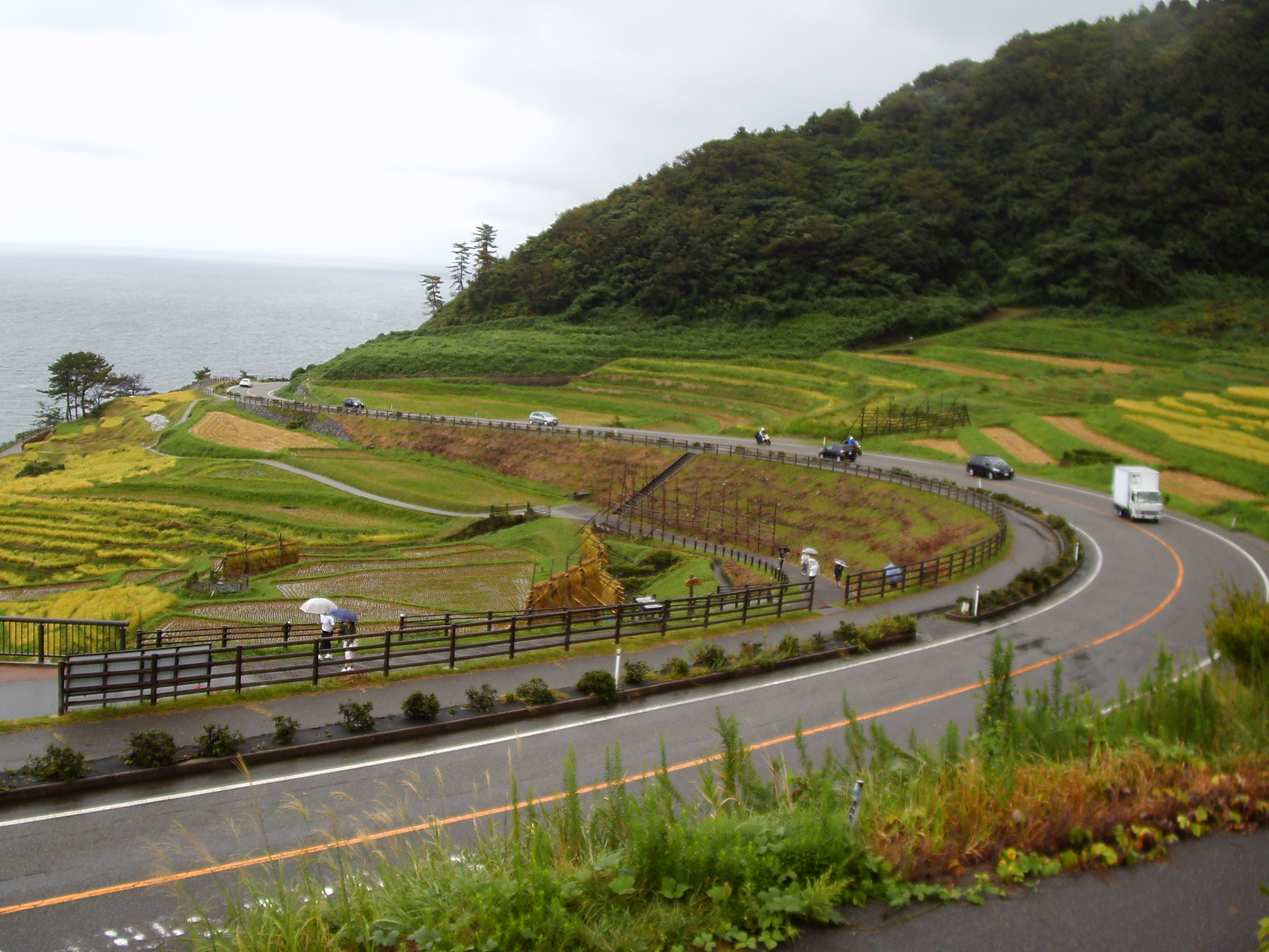 白米千枚田の中を通る国道249号線